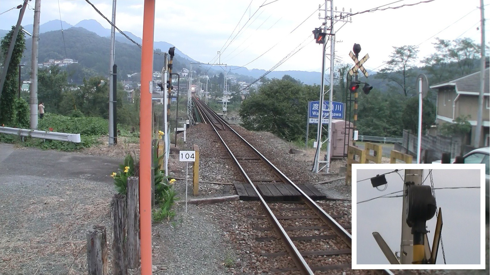 上毛電鉄 富士山下駅踏切の電鈴式 警音器 (2011年9月30日)